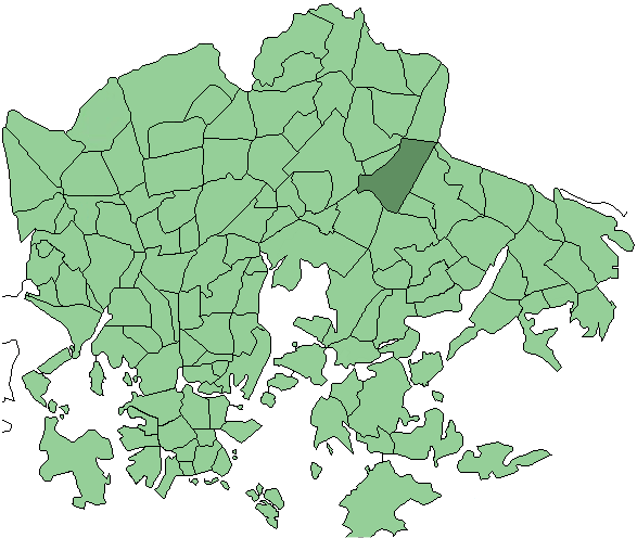 Districts of Helsinki, Kivikko highlighted (in Finnish: Kivikon osa-alue korostettuna)